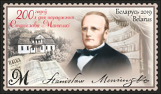 Беларуская (тарашкевіца): Паштовая марка Беларусі №1304 «200 гадоў зь дня нараджэньня Станіслава Манюшкі»